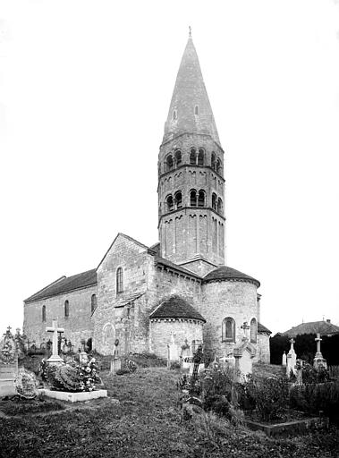 Église de Saint-André-de-Bâgé par Henri Heuzé en 1915.